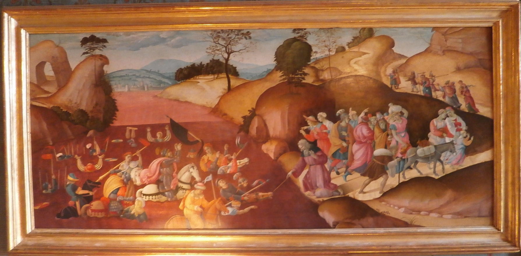 "Le passage de la Mer Rouge" par Filippino Lippi v.1490